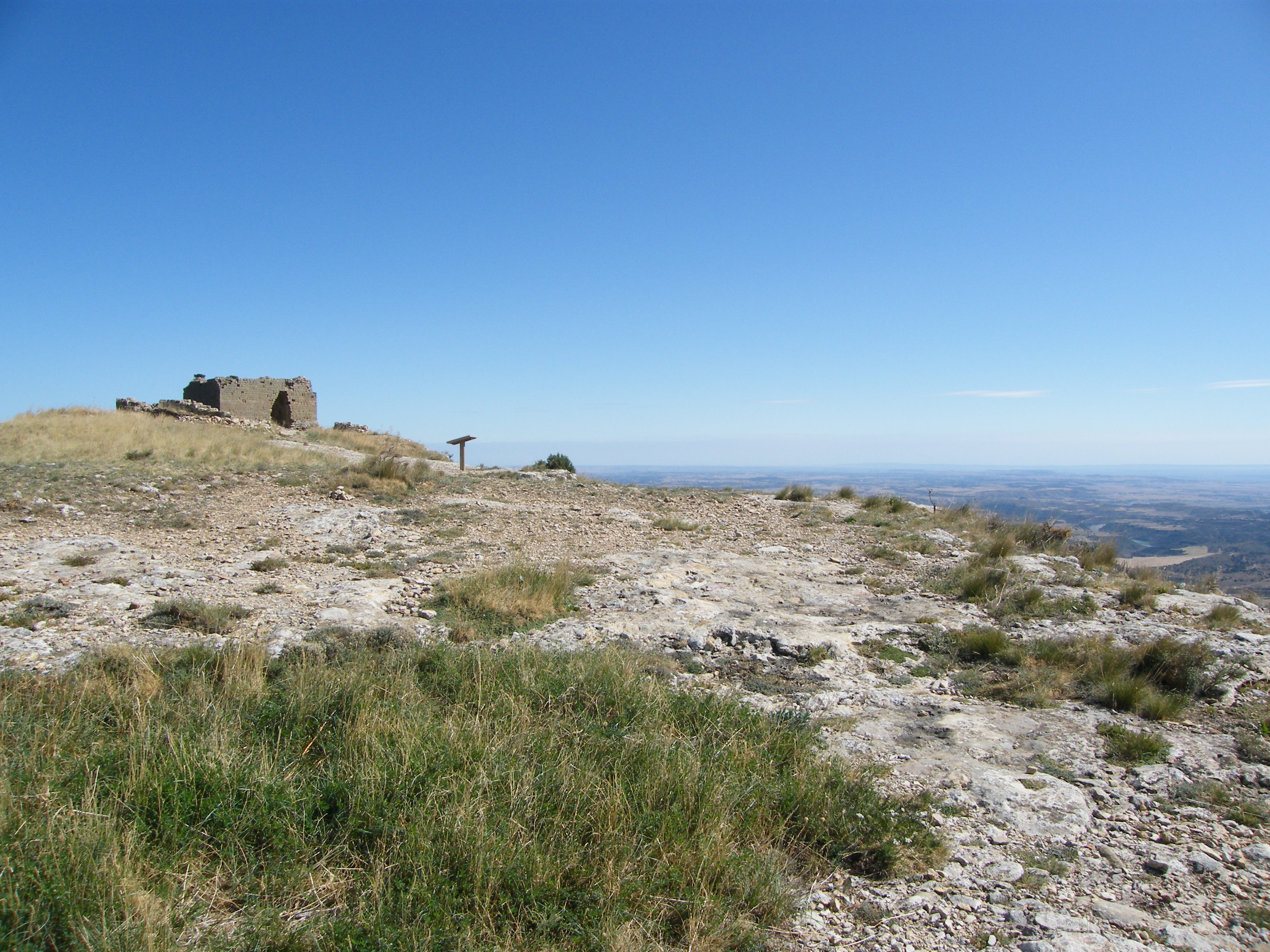 Salto de Roldán, au sommet de la Peña de San Miguel (ou Peña de Sen), de vue sur les ruines